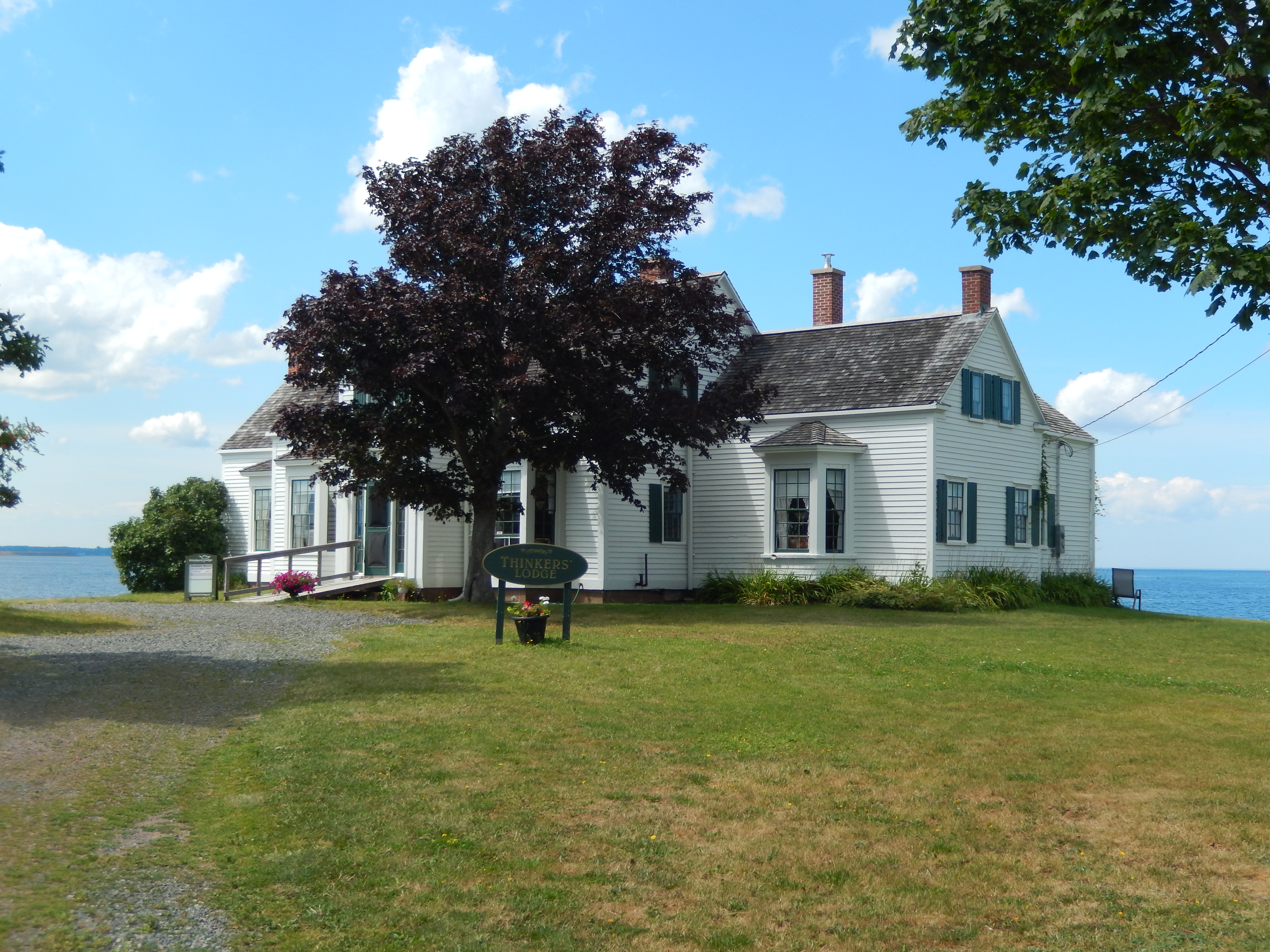 Thinkers' Lodge à Pugwash (Nouvelle-Écosse)